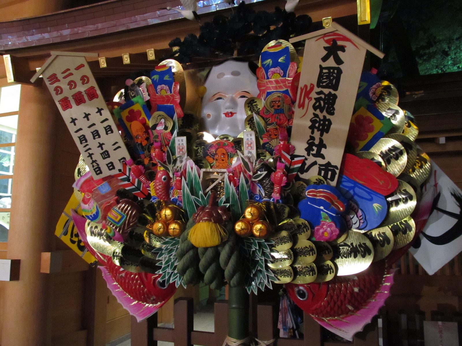 酉の市（とりのいち・torinoichi）、大國魂神社（東京都府中市）、熊手、お祭り、祭礼